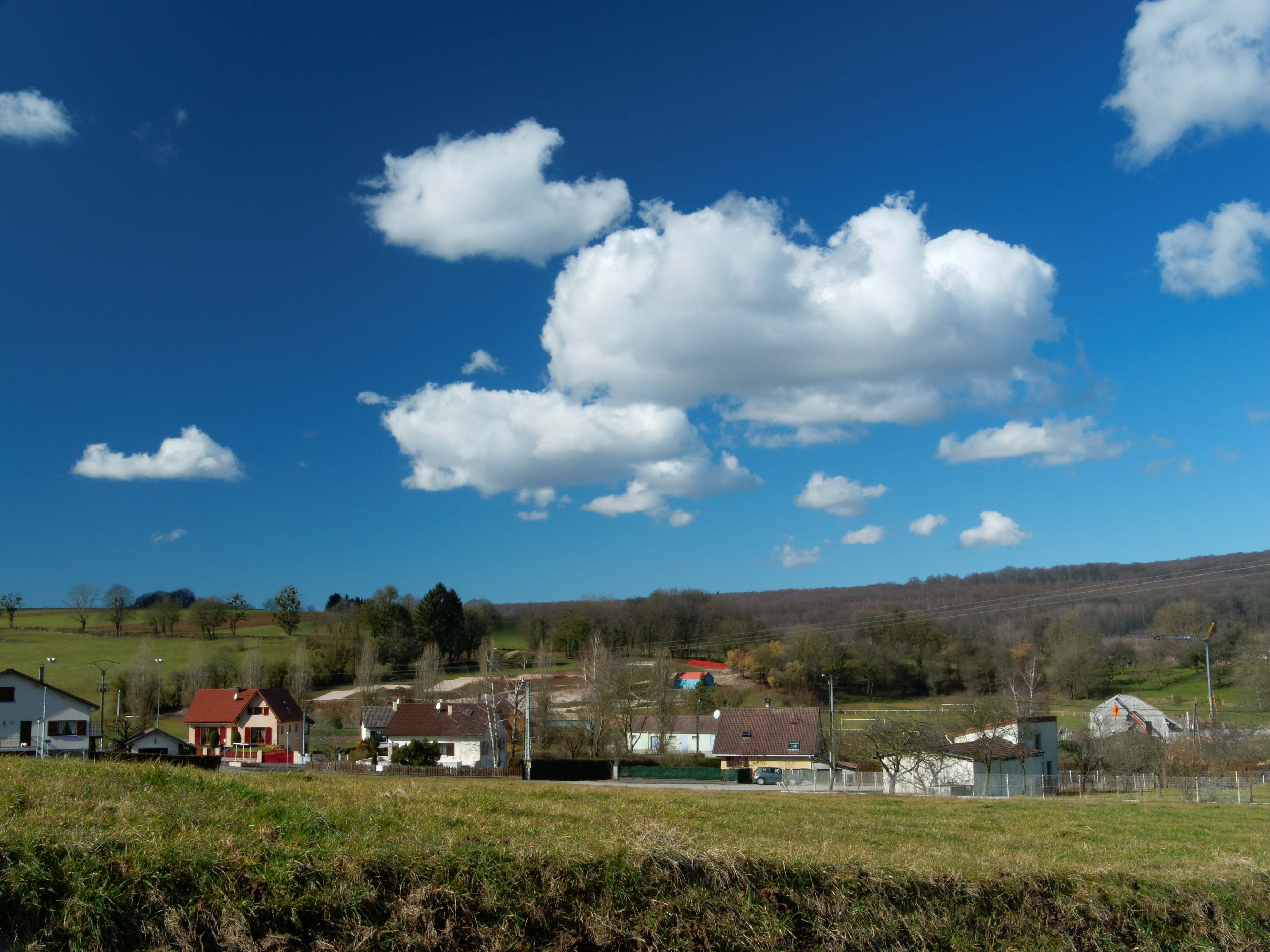 Paysage à Champey. Photo réalisée avec un filtre polarisant.